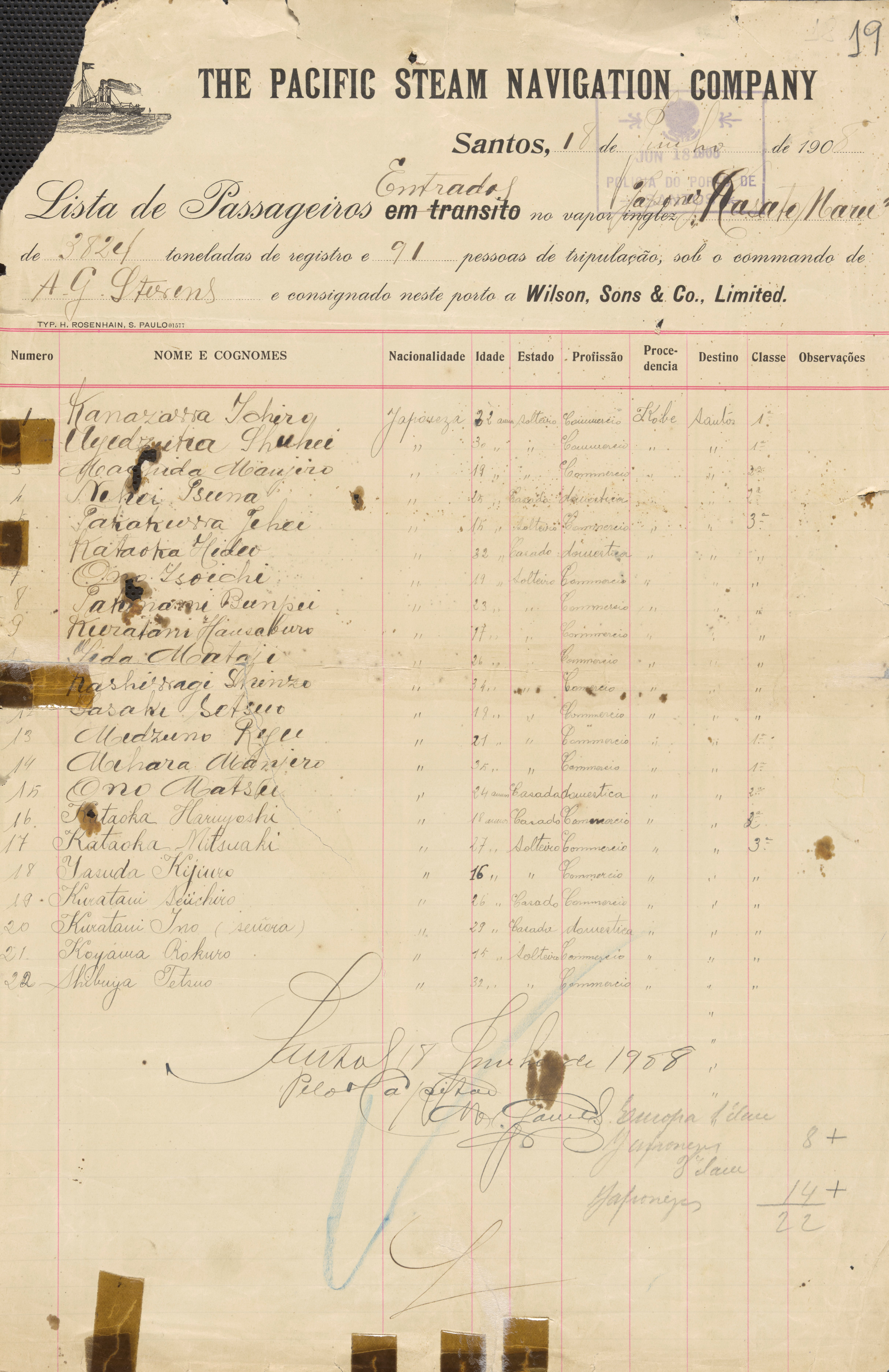 Primeira Página da Lista de Passageiros do Kasato Maru, trazendo os primeiros imigrantes japoneses para o Brasil. Fundo arquivístico: Serviço de Polícia Marítima, Aérea e de Fronteiras - SP (Santos).